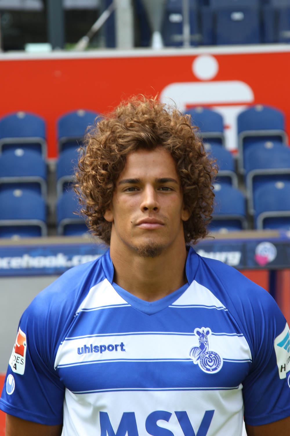 Rolf Feltscher 2015